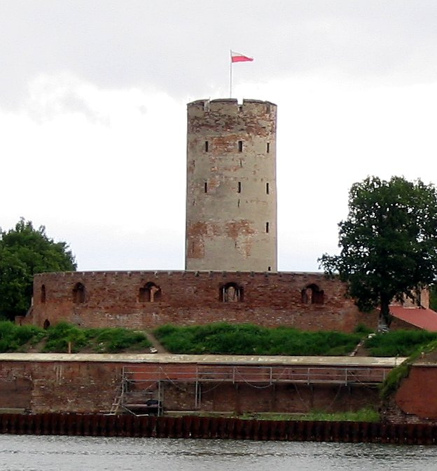 Twierdza Wisłoujście, Gdańsk